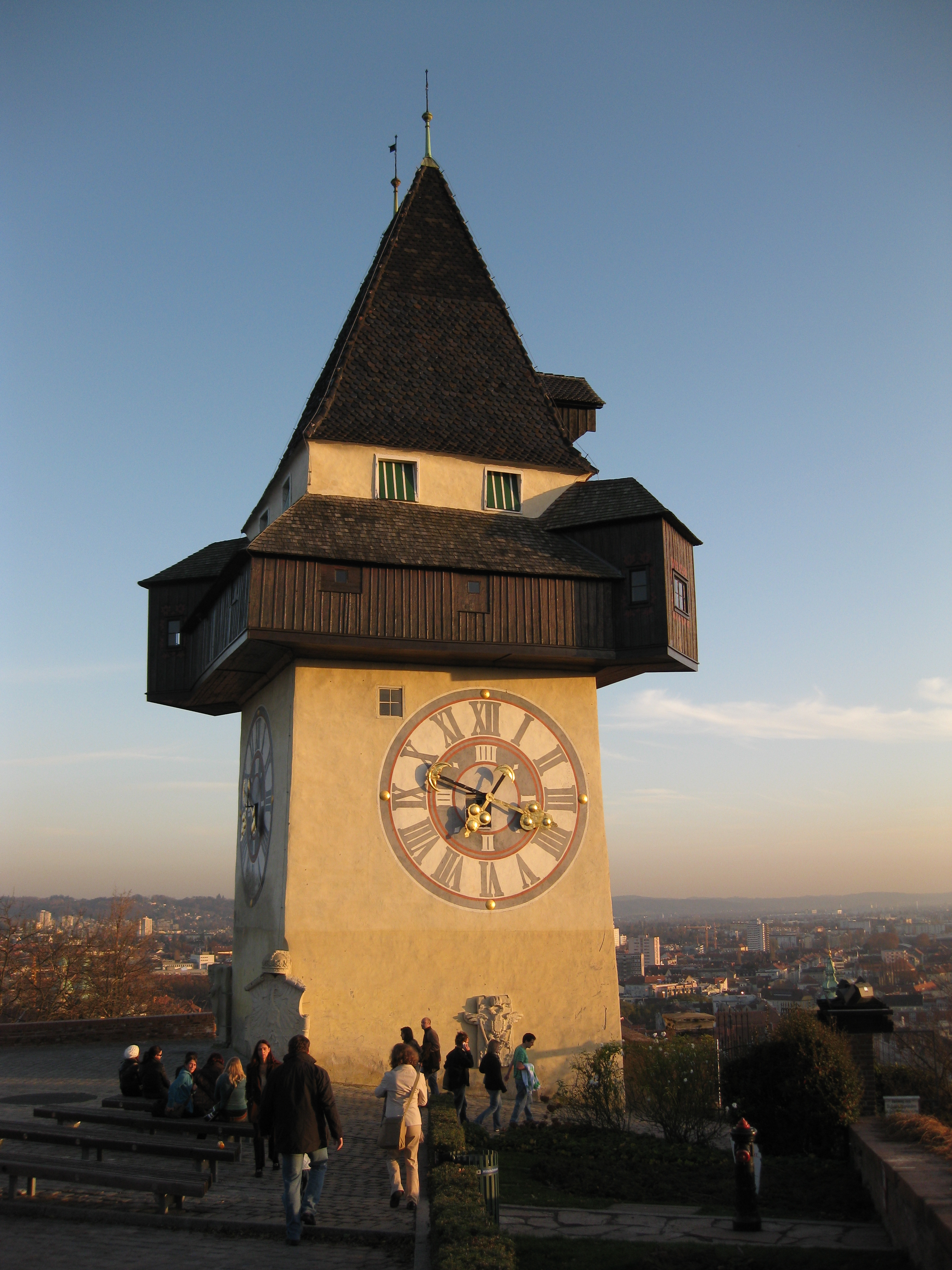 Der Grazer Uhrturm. Wahrzeichen der Stadt.